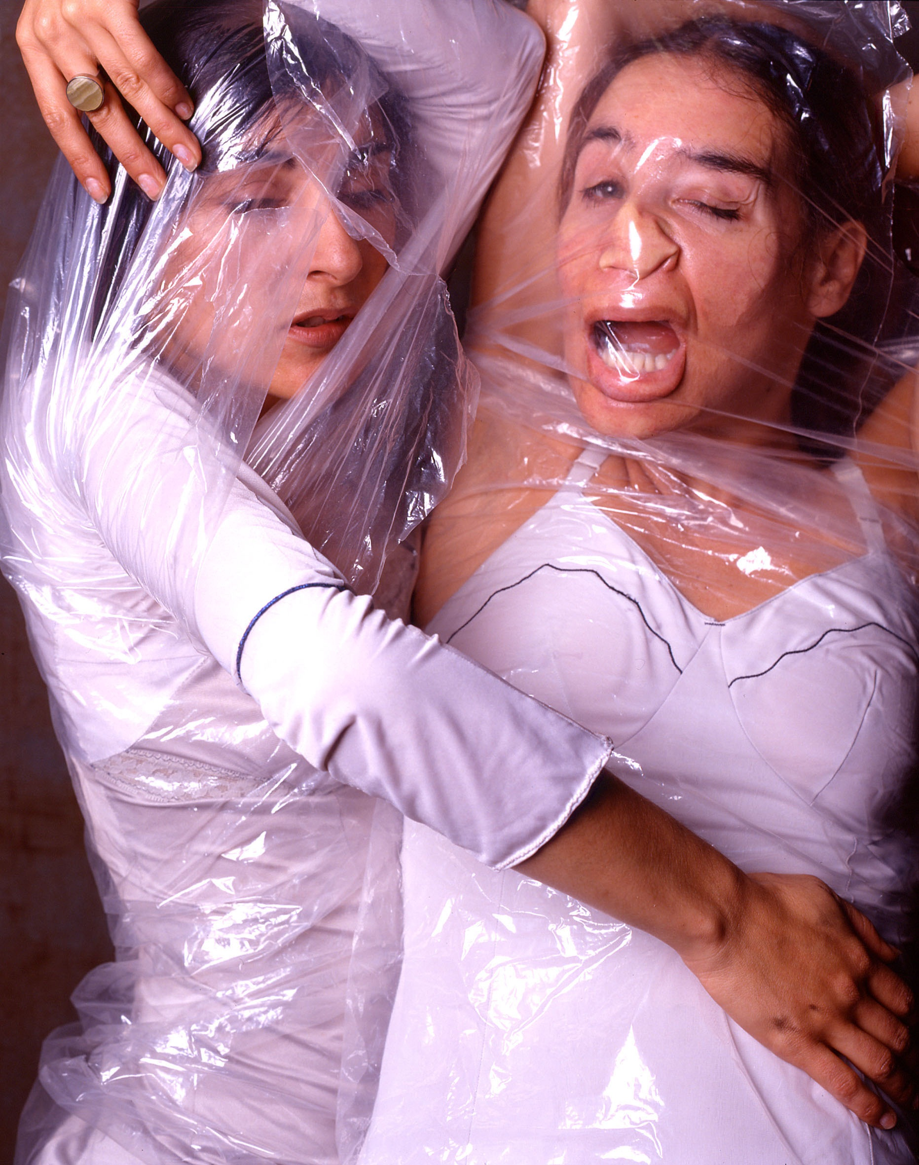 עלית קרייז ואנטון מירטו במיצג Do you want this once again